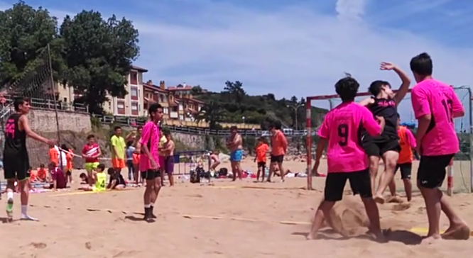 Gol doble en balonmano playa